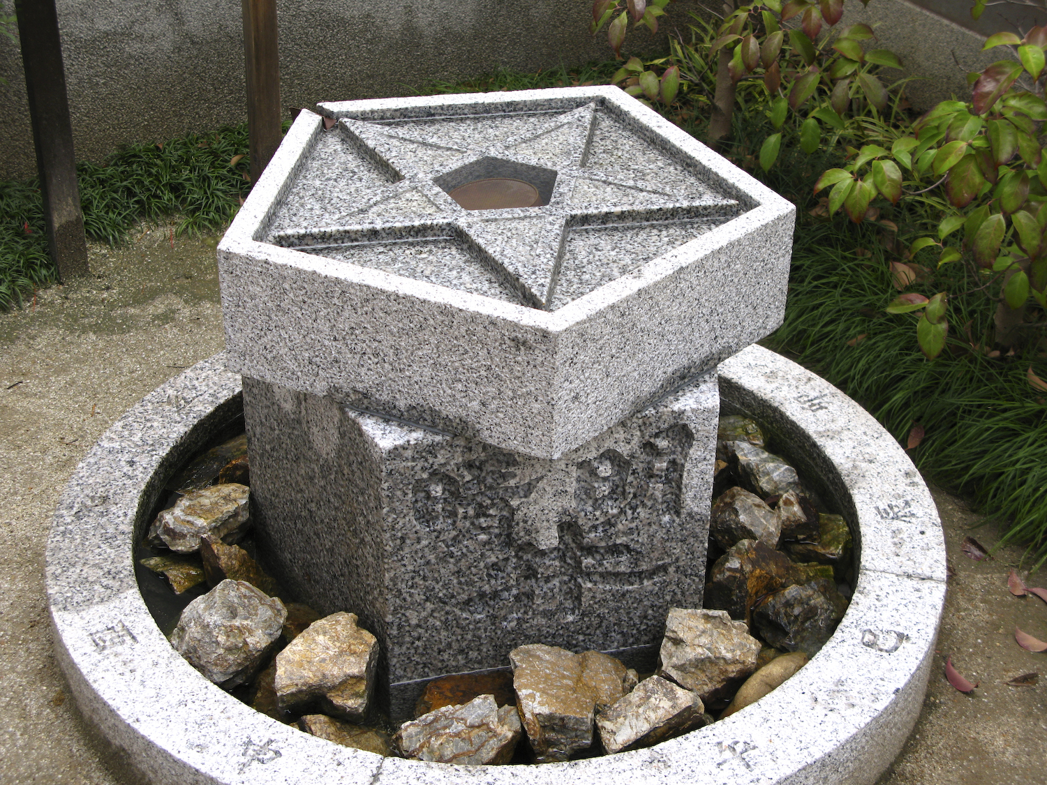 Seimei Shrine 晴明神社 devoted to Abe no Seimei. Kyoto, Japan. Seimei Well